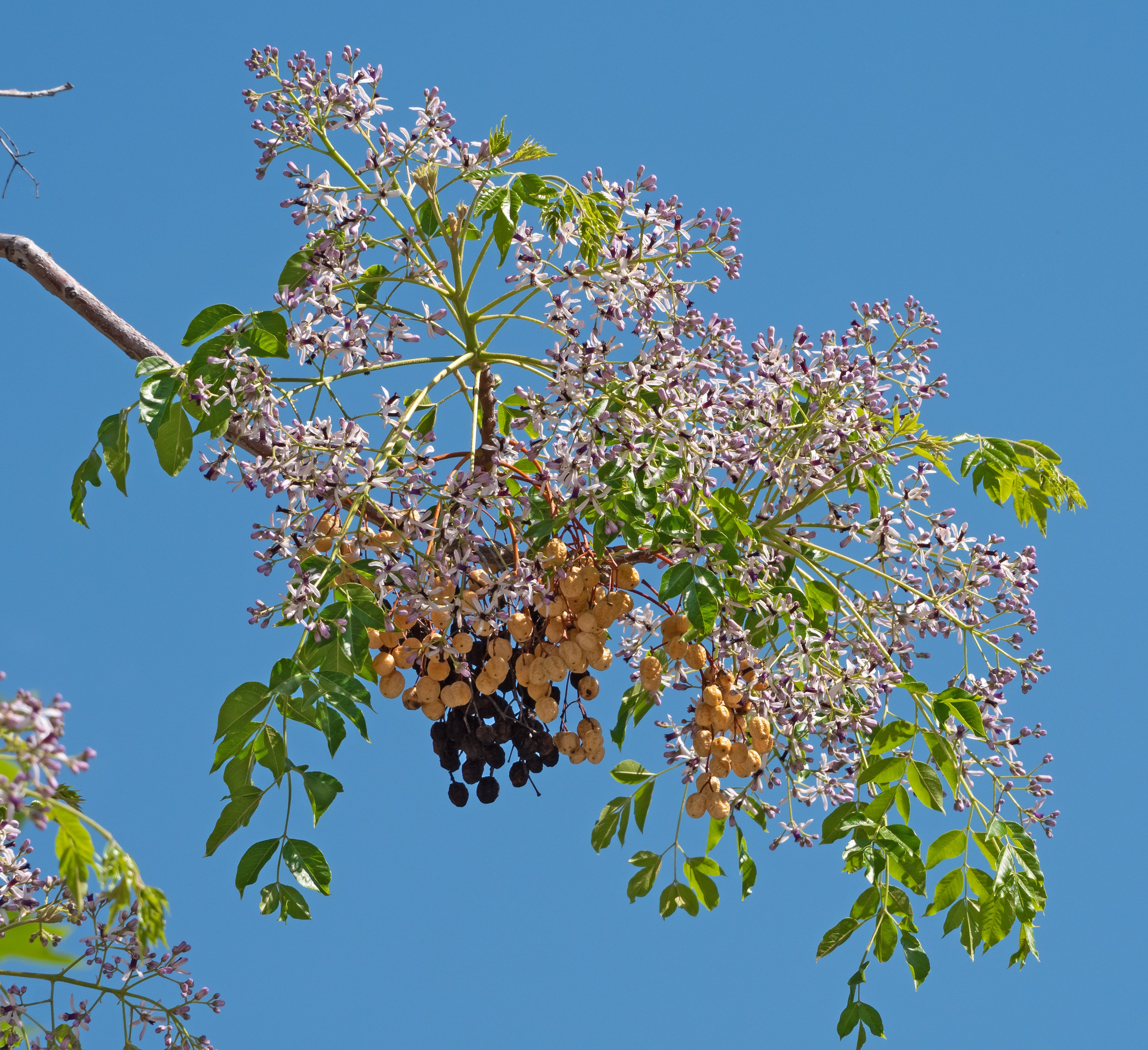 Melia azedarach; rama con flores del año y frutos de dos años anteriores. Losar de la Vera (Cáceres, España).